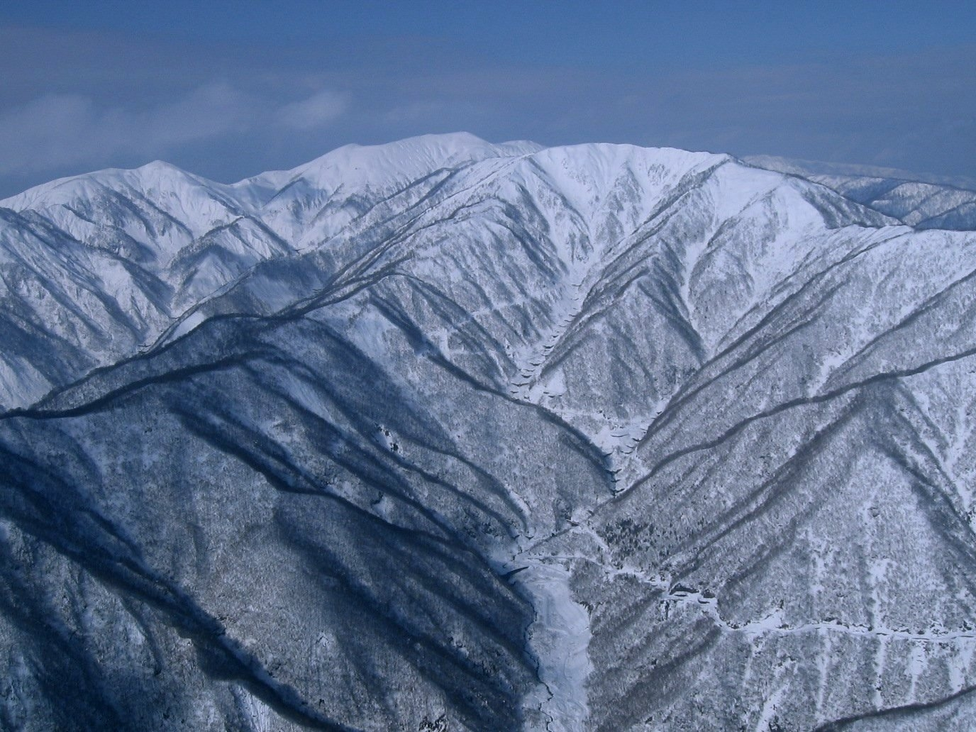 Mt.Nougouhakusan